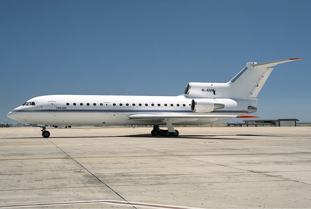 4L-AAM, Adjarian Airlines Yakovlev Yak-42, Faro